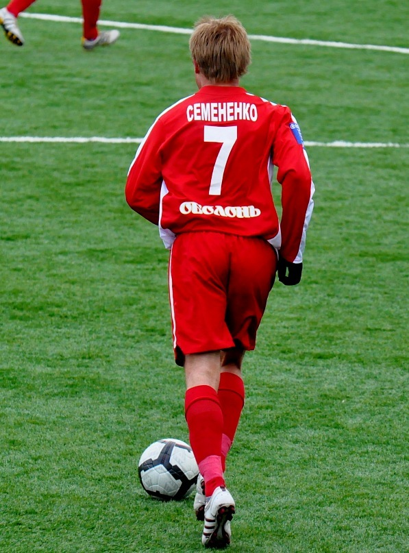 Артём Семененко — украинский футболист